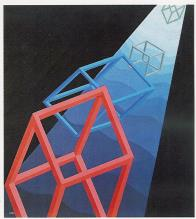 Dipinto a olio di Mario Marè (1921 - 1993), eseguito nel 1984. Titolo: Istante (Ascensione).